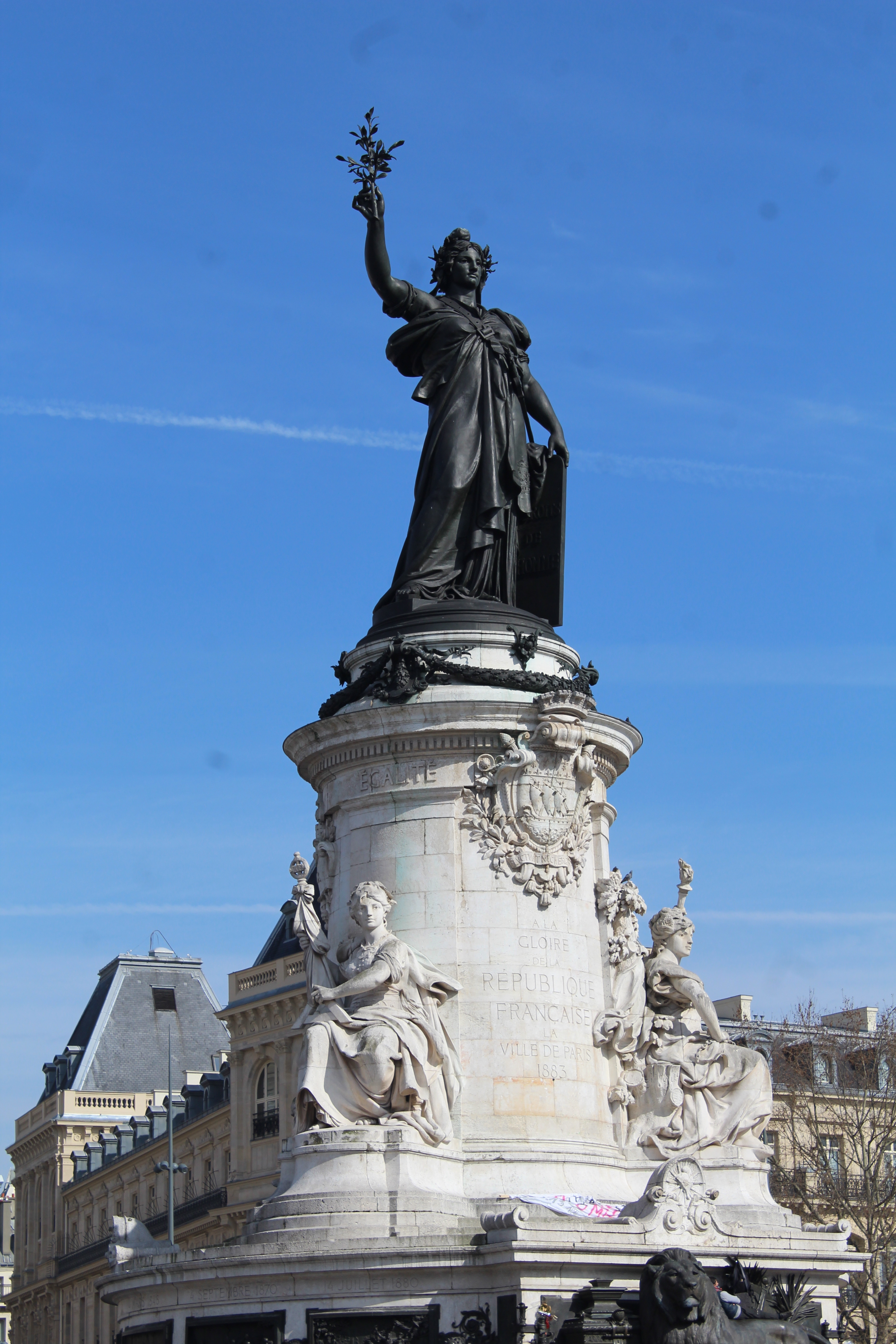 Monument à la République sur la place de la République à Paris.